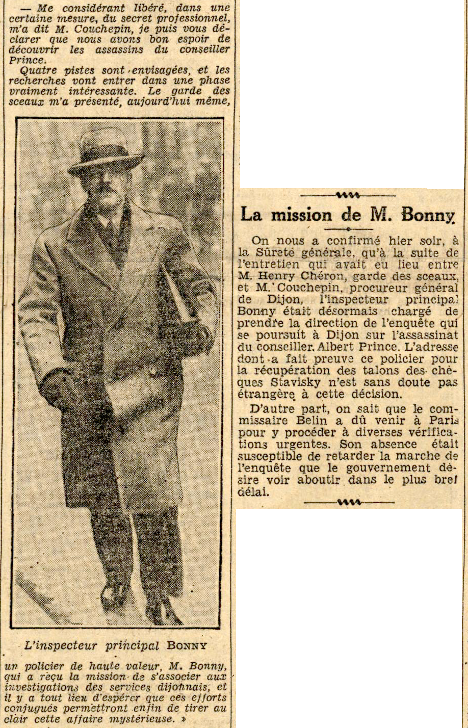 L'inspecteur Bonny mis en scène par la presse lors de l'affaire Prince : l'exemple du quotidien le Journal du 5 mars 1934, lorsque l'enquête lui est confiée par le ministre de la justice, Henry Chéron.